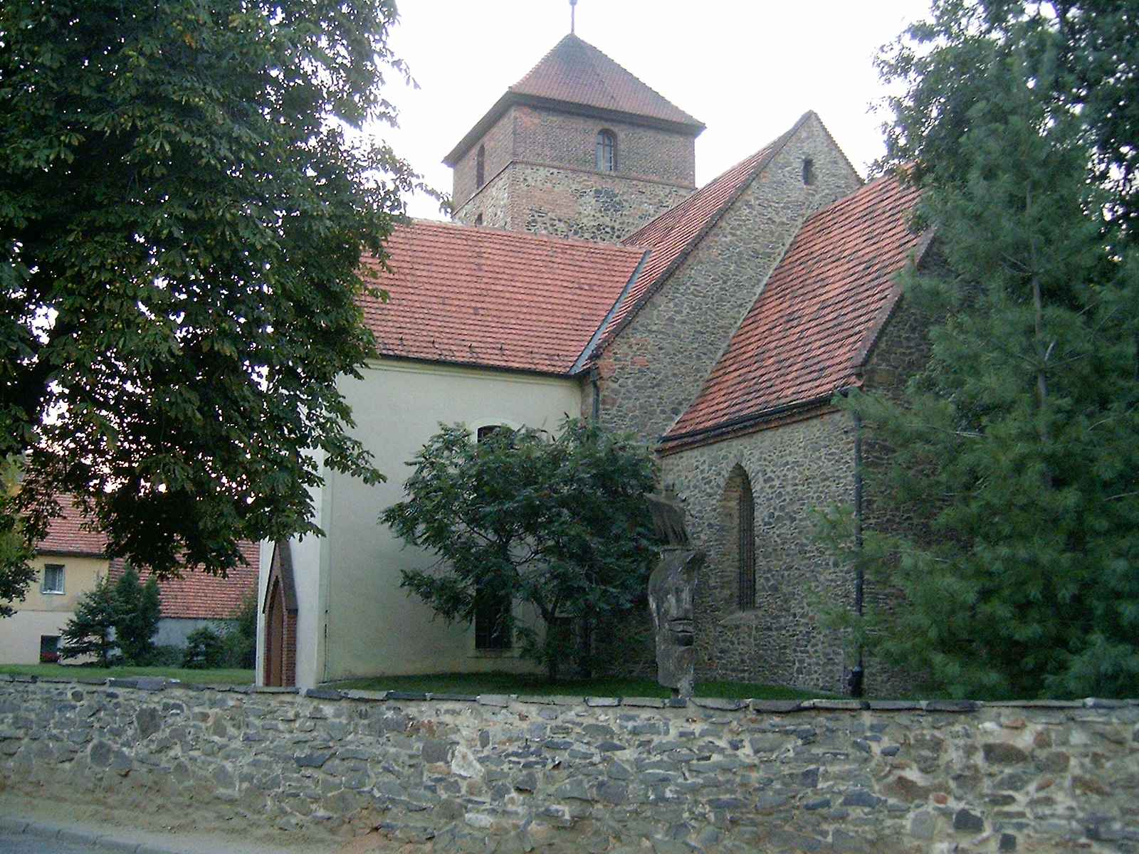 Legnickie Pole - dawny kościół św. Trójcy i NPM, obecnie Muzeum Bitwy Legnickiej